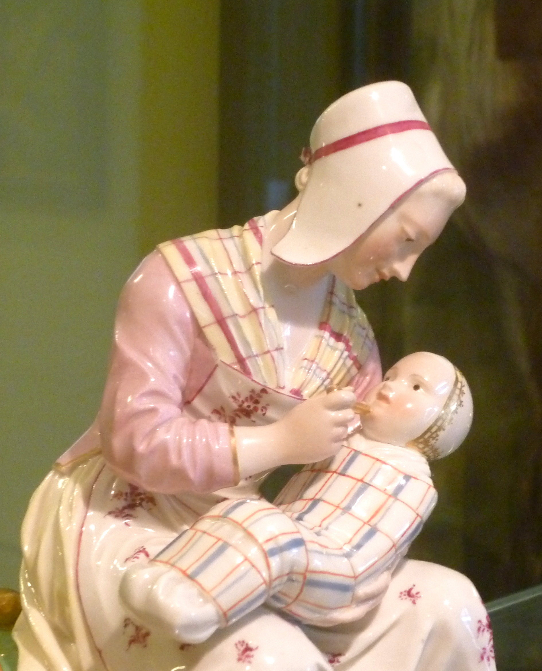 Gewickeltes Kind wird gefüttert, ca. 1770, Die Schustersfrau von Johann Peter Melchior (1747 – 1825), Höchster Porzellanmanufaktur Höchst/Frankfurt am Main, (Landesmuseum, Mainz)